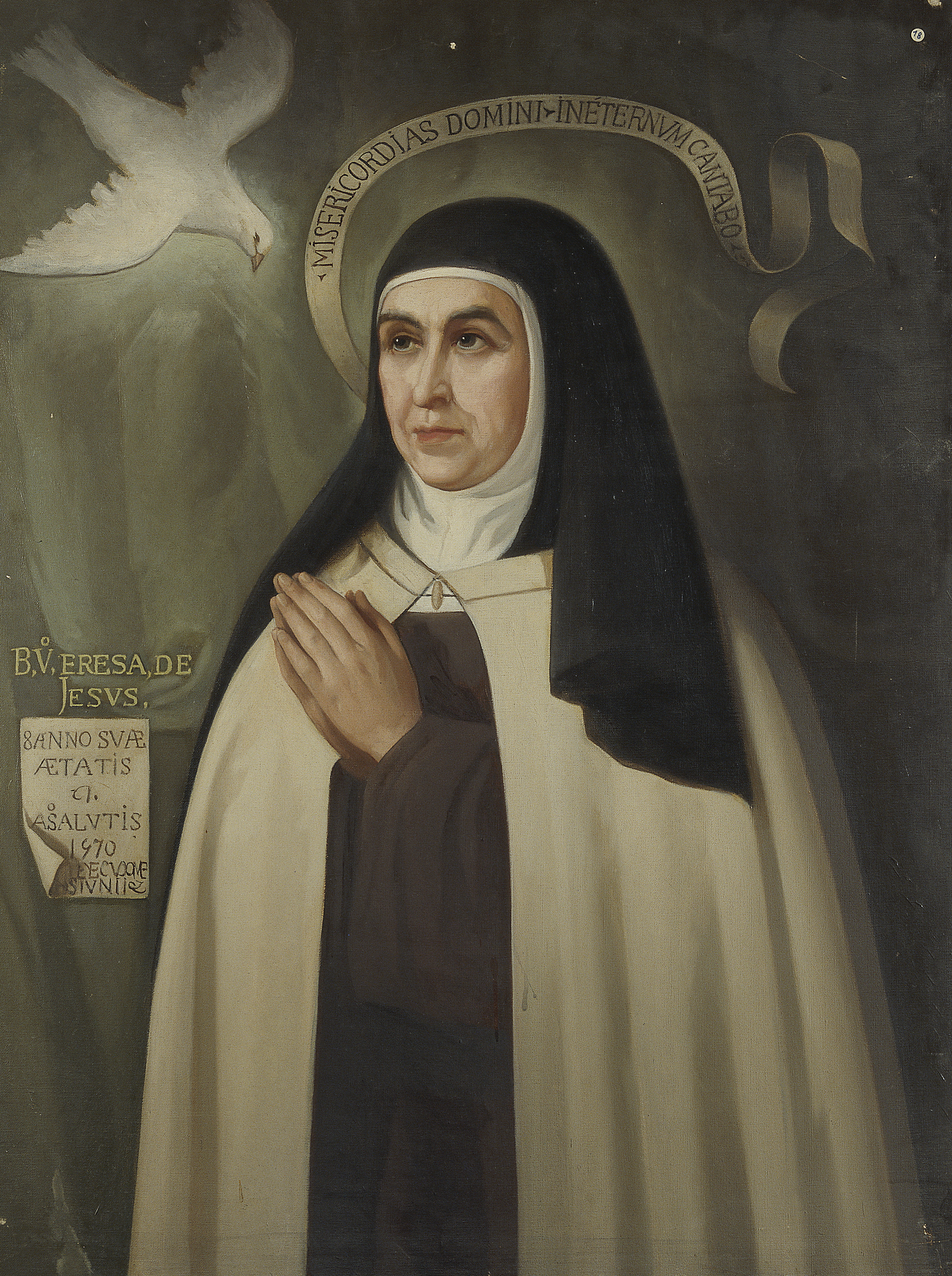 Retrato de la mística española Santa Teresa de Jesús (1515-1582).